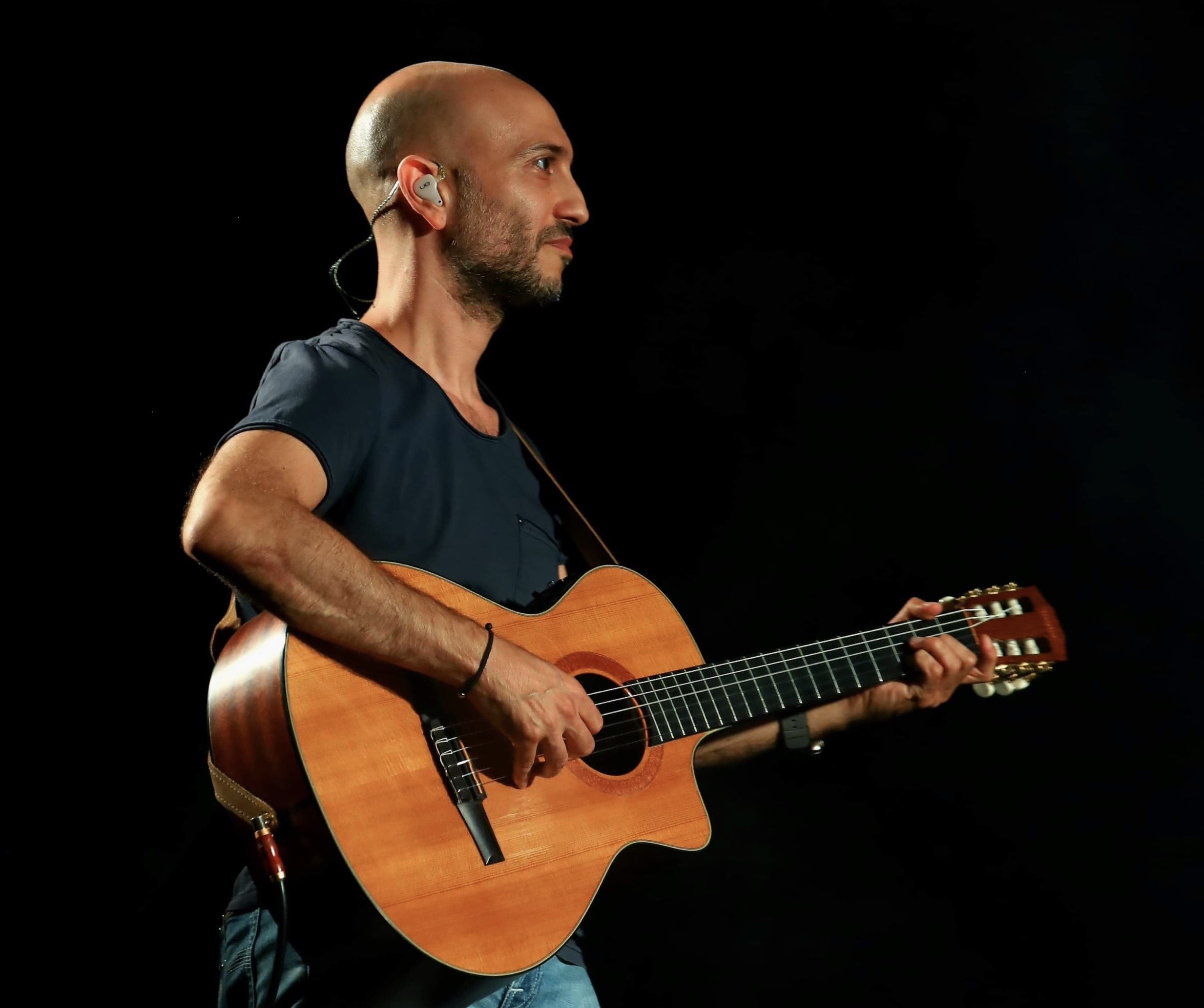 מתוך הופעה עם גלי עטרי